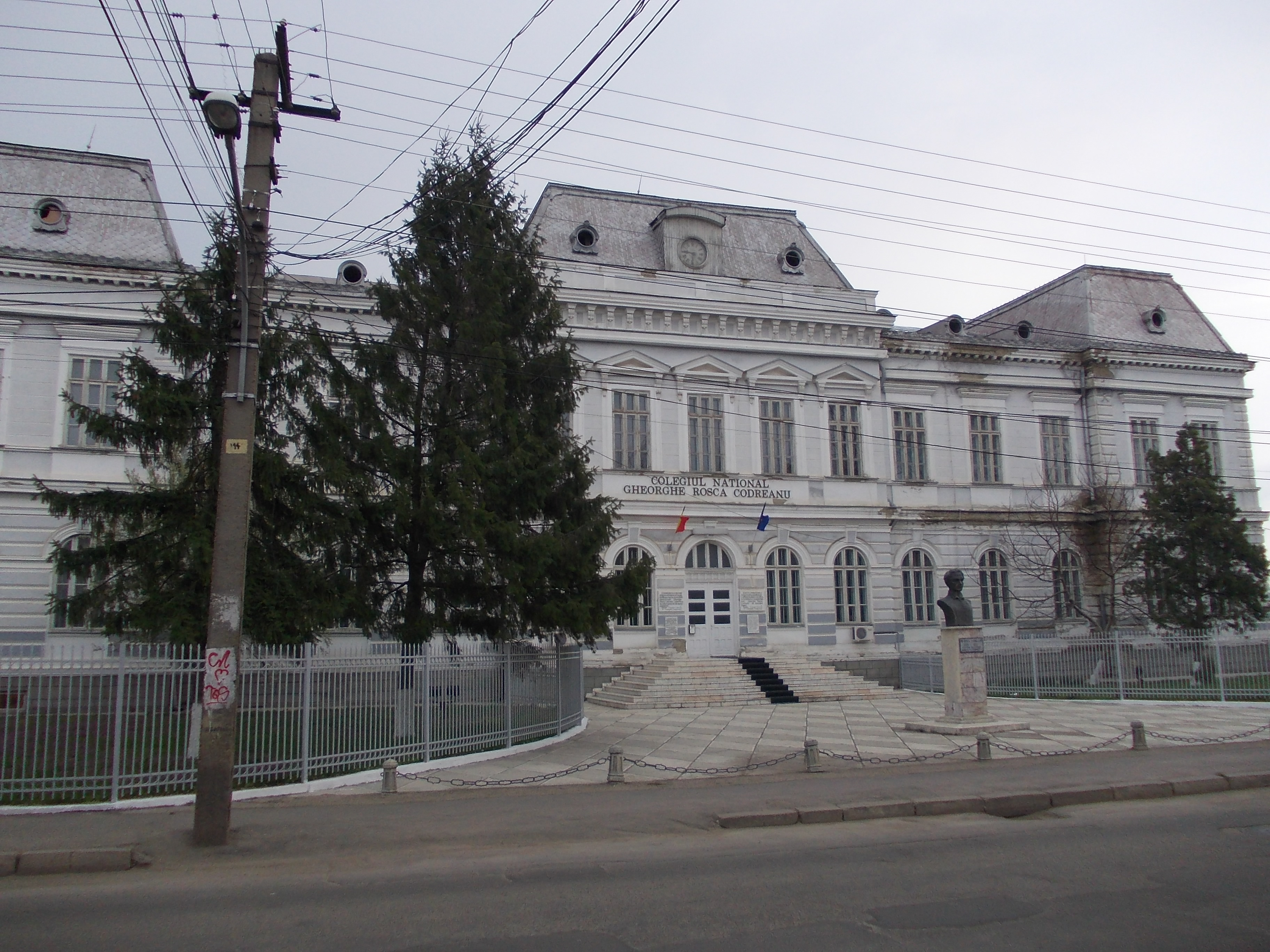 Colegiul_Roşca_Codreanu din Bârlad